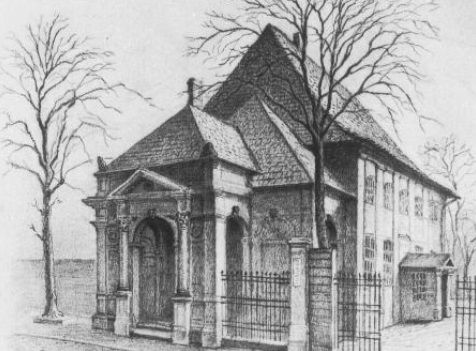 Federzeichnung von Ludwig Schwarz der alte Reformierten Kirche an der Kleinen Freiheit 10 von 1918